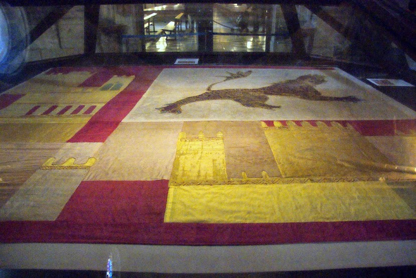 Pendón de San Fernando, custodiado y expuesto en el interior de la catedral de Sevilla, (España).